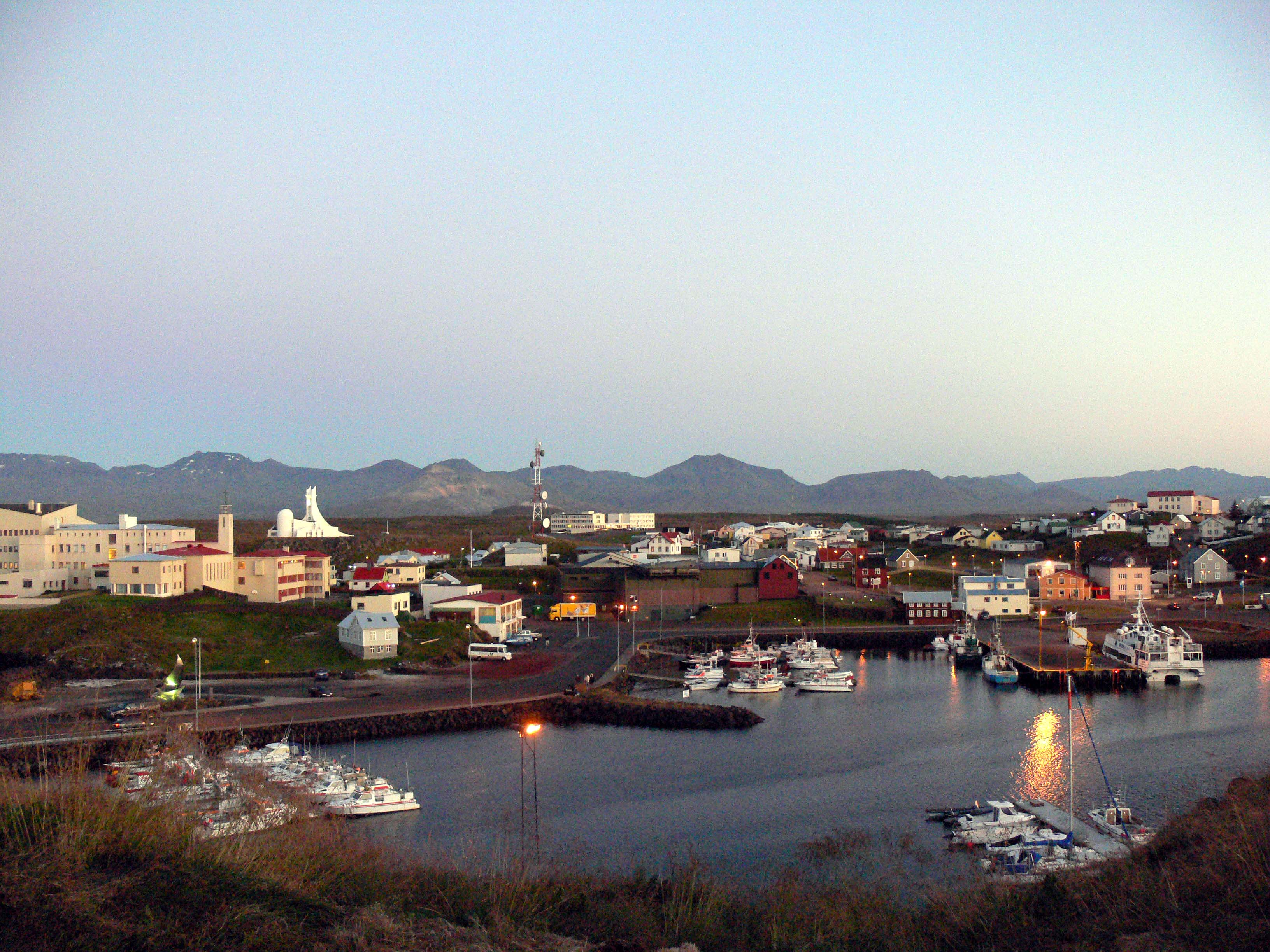 Stykkishólmur Hafen